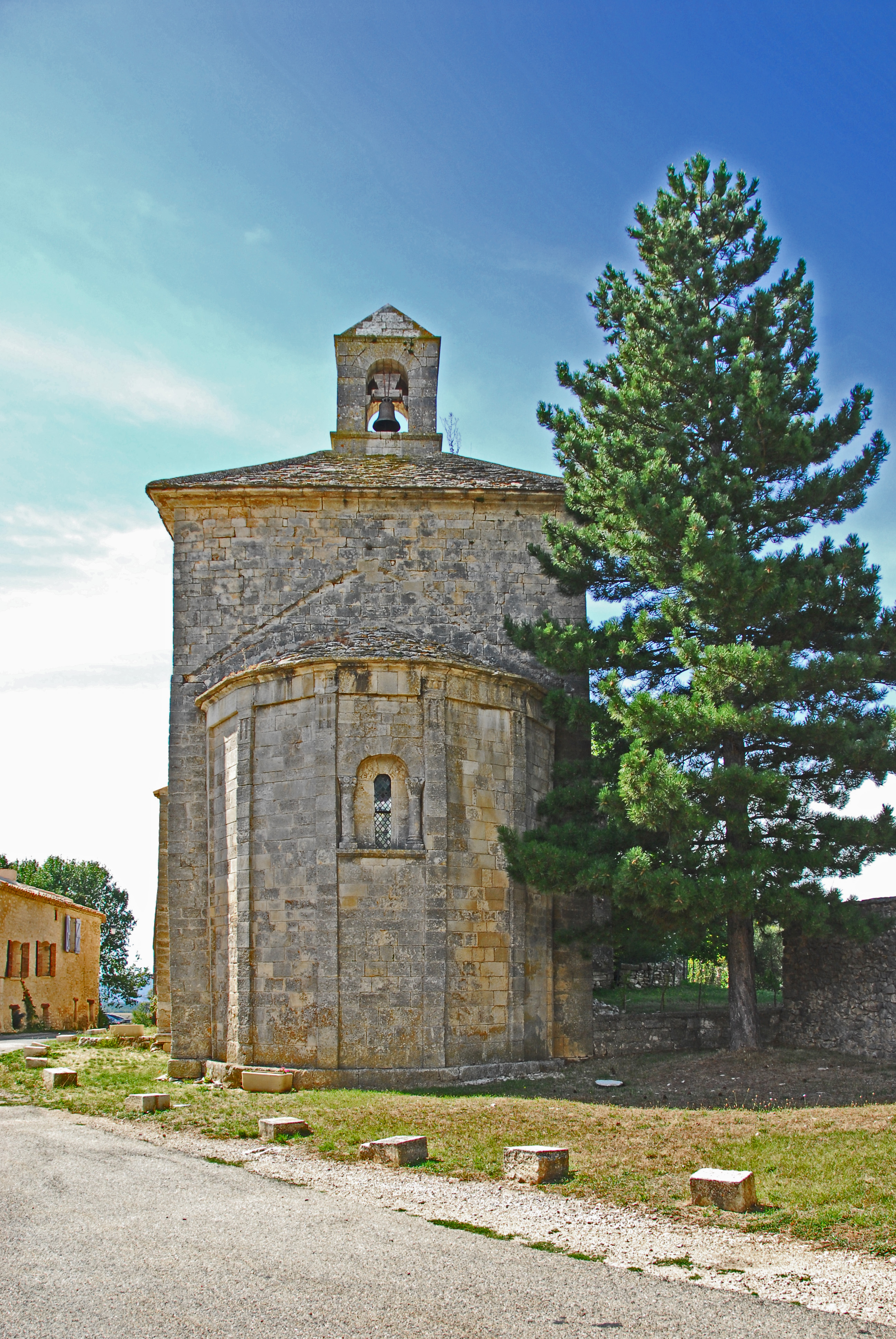 St-Trinit, Chorjoch mit Ansis von Osten